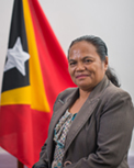 Maria Rosa da Câmara, Abgeordnete des Nationalparlaments Osttimors